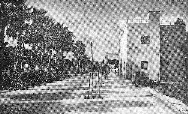 שדרות ארלוזורוב בעפולה